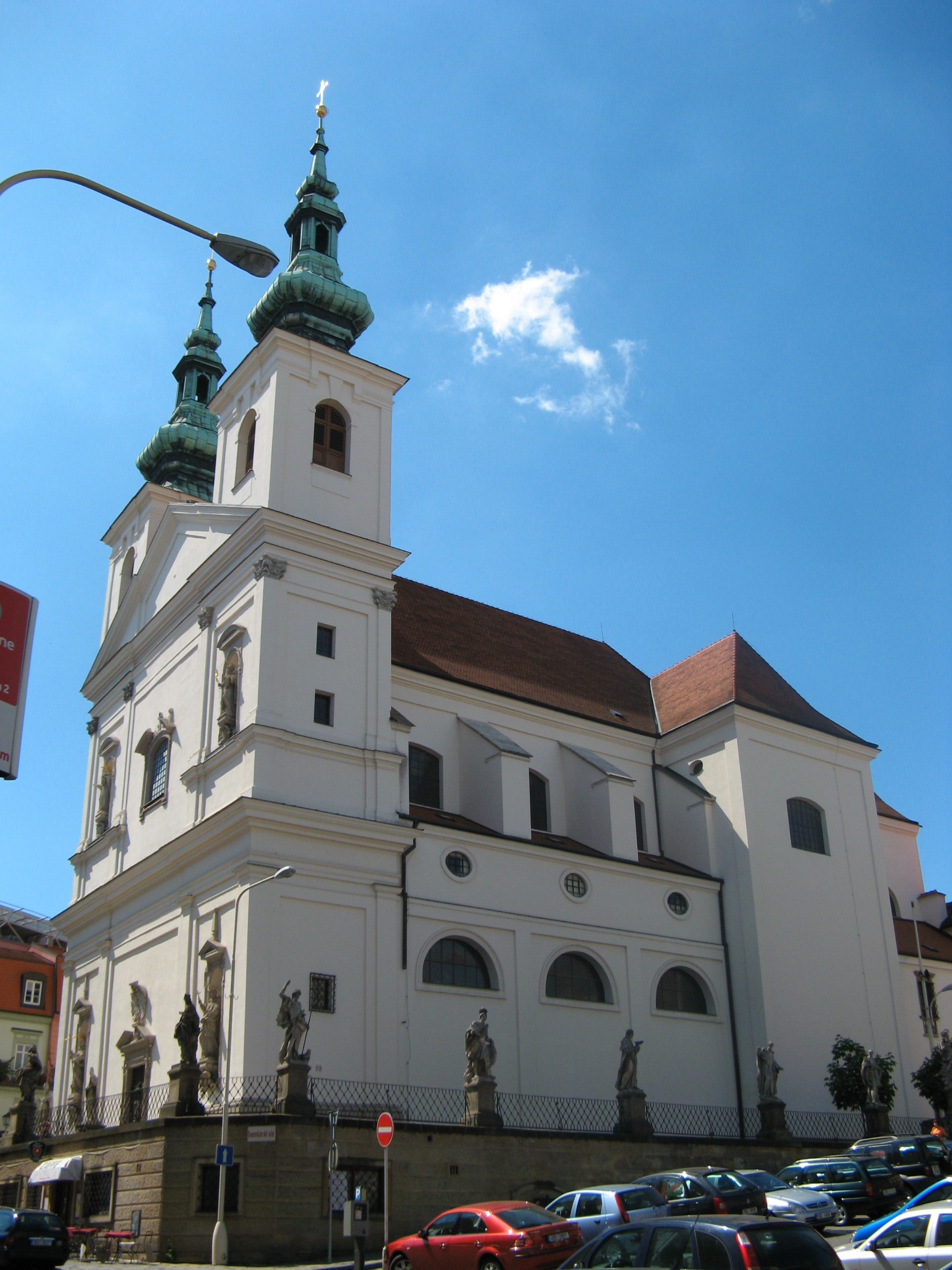 Kostel sv. Michala, pohled z Dominikánského náměstí, Brno